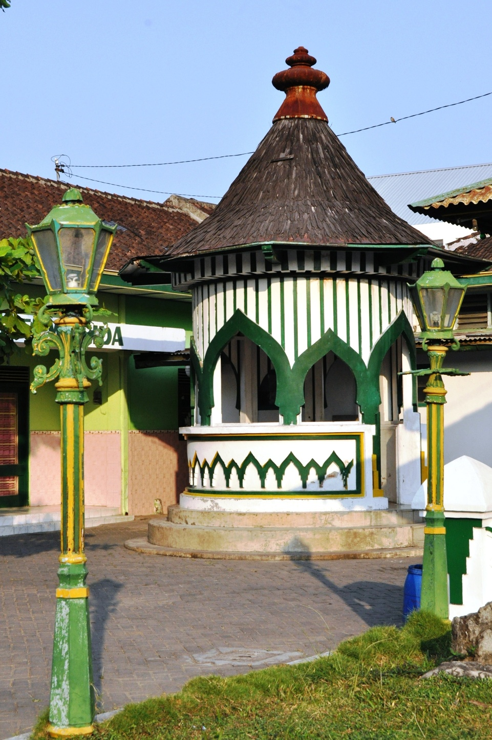 Bangunan maligen, dulu tempat dilakukannya khitanan (sunatan) bagi putra atau kerabat dekat raja.